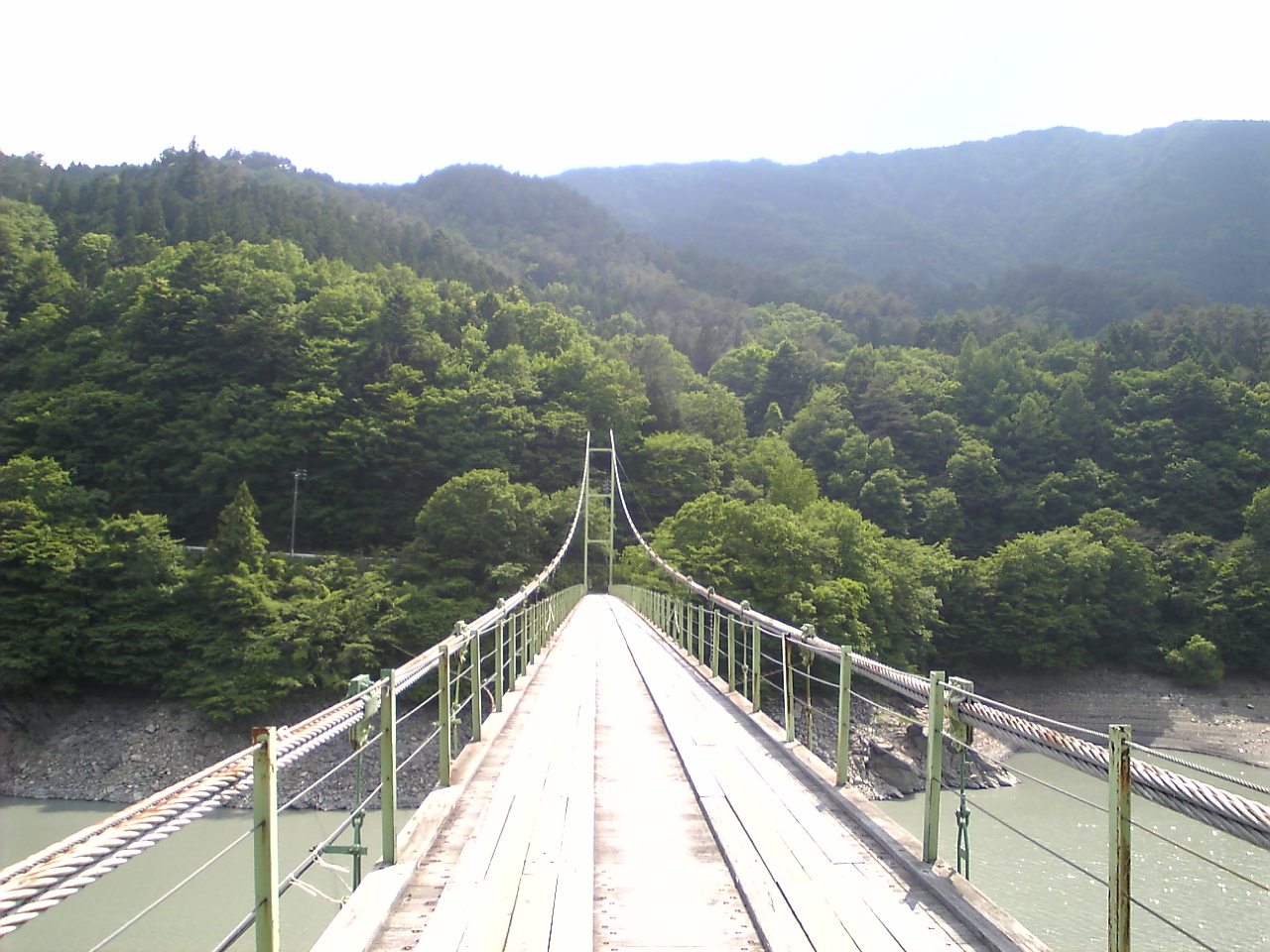 井川大橋